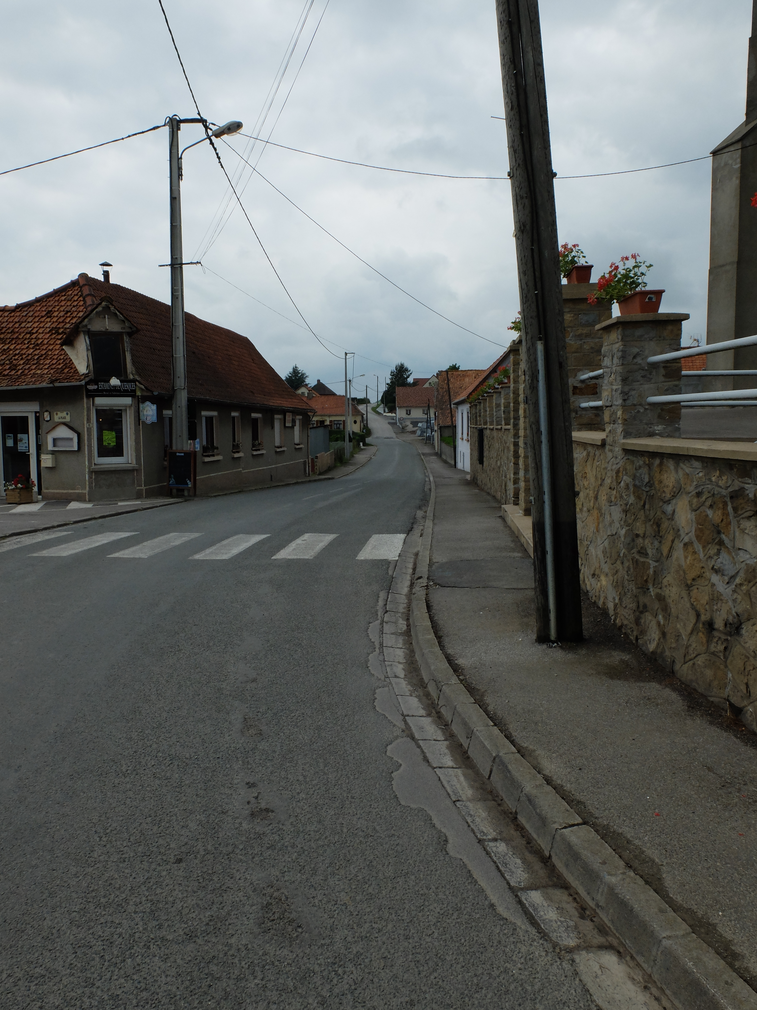 Vue de la rue principale de Quesques.